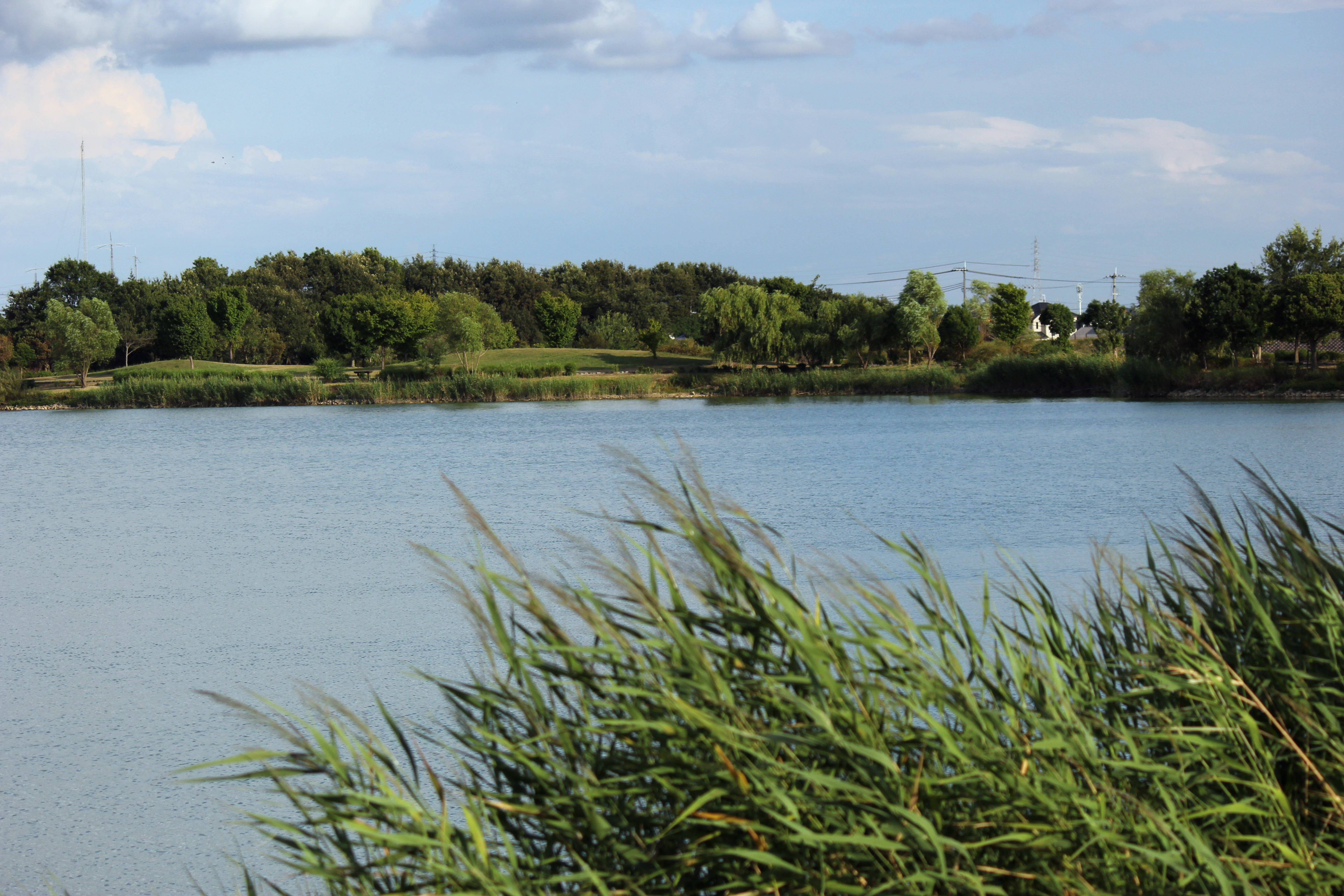 加古大池にある葦原